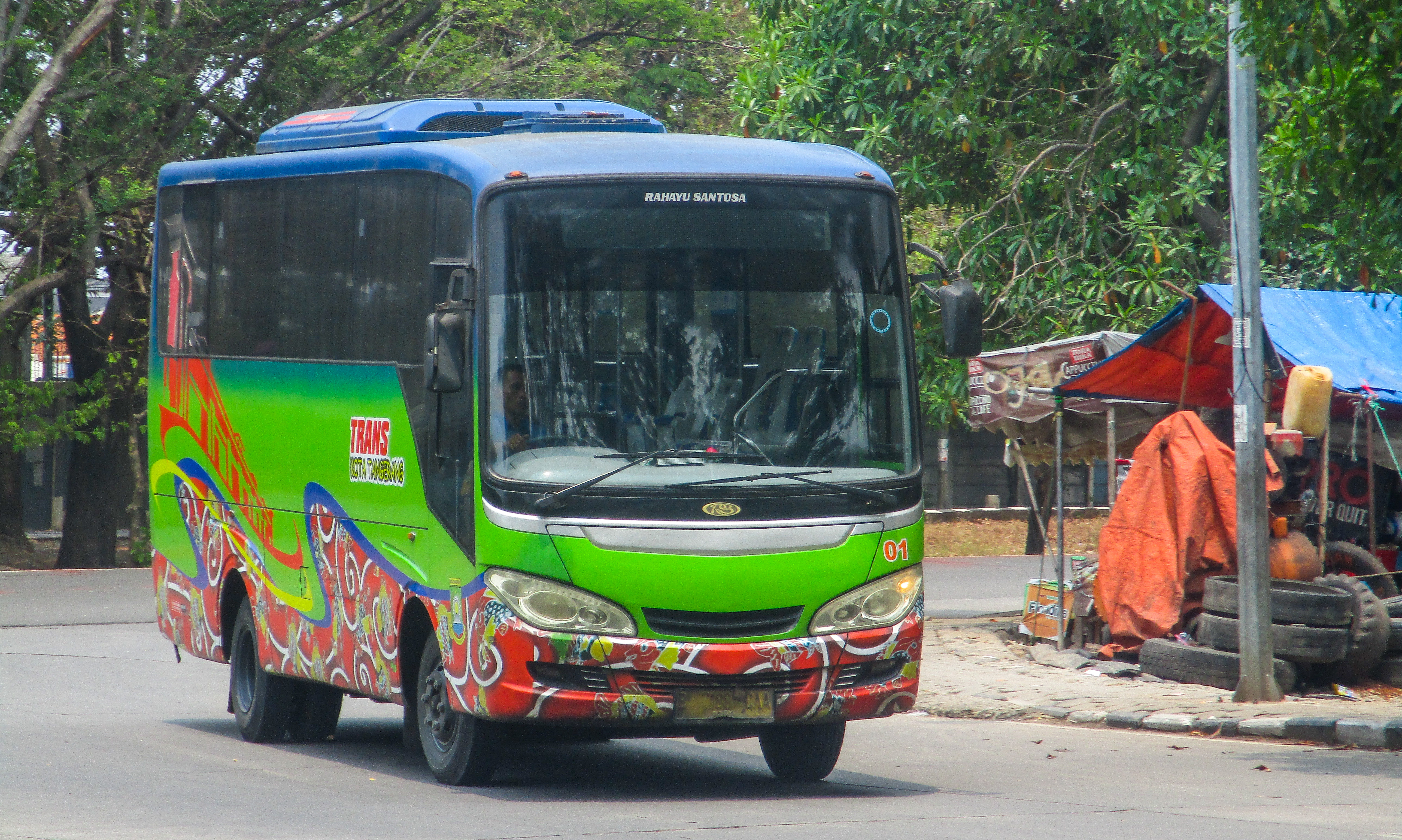 Armada koridor 1 memasuki Terminal Poris